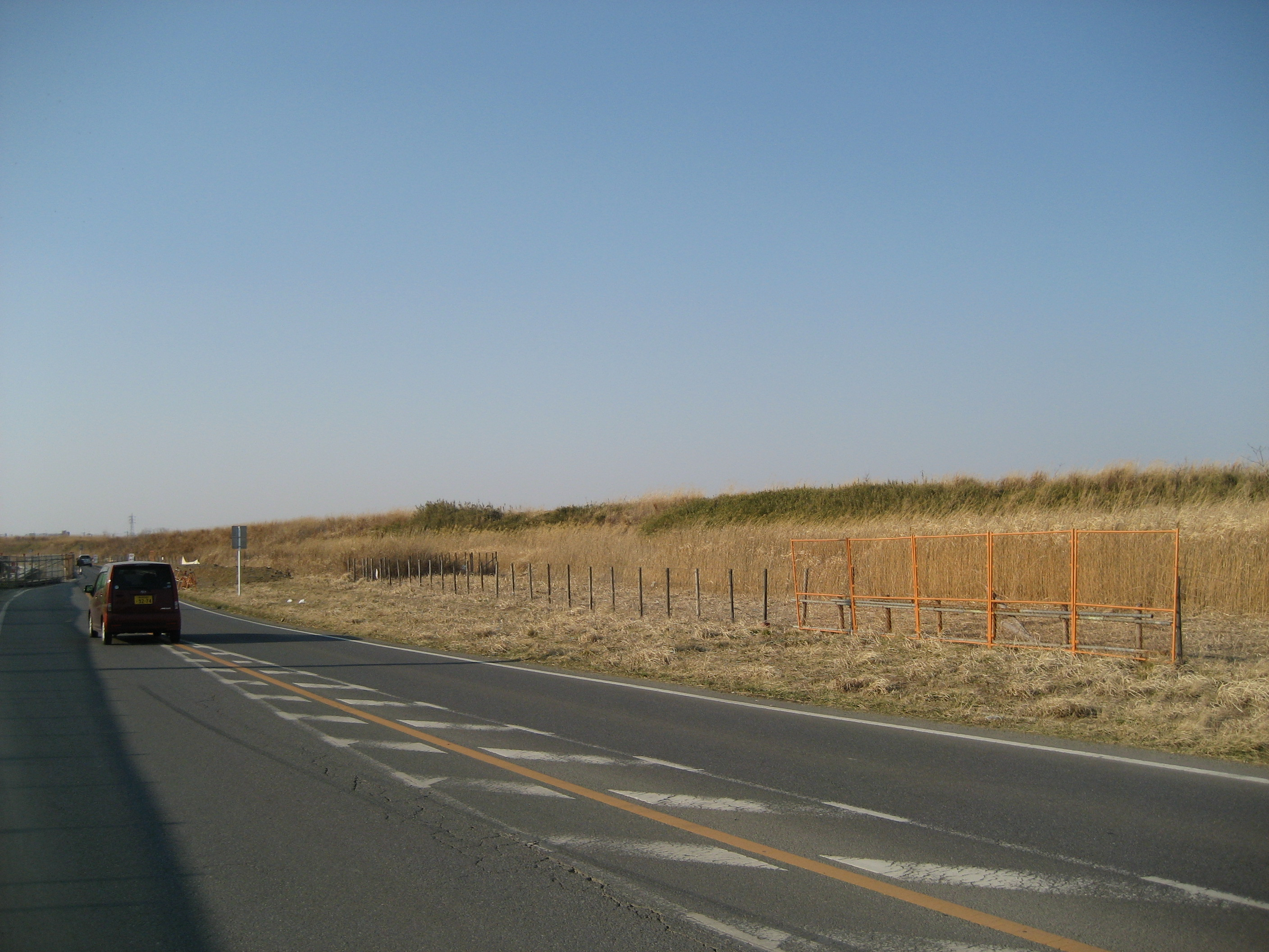 武蔵野操車場跡地、吉川市側